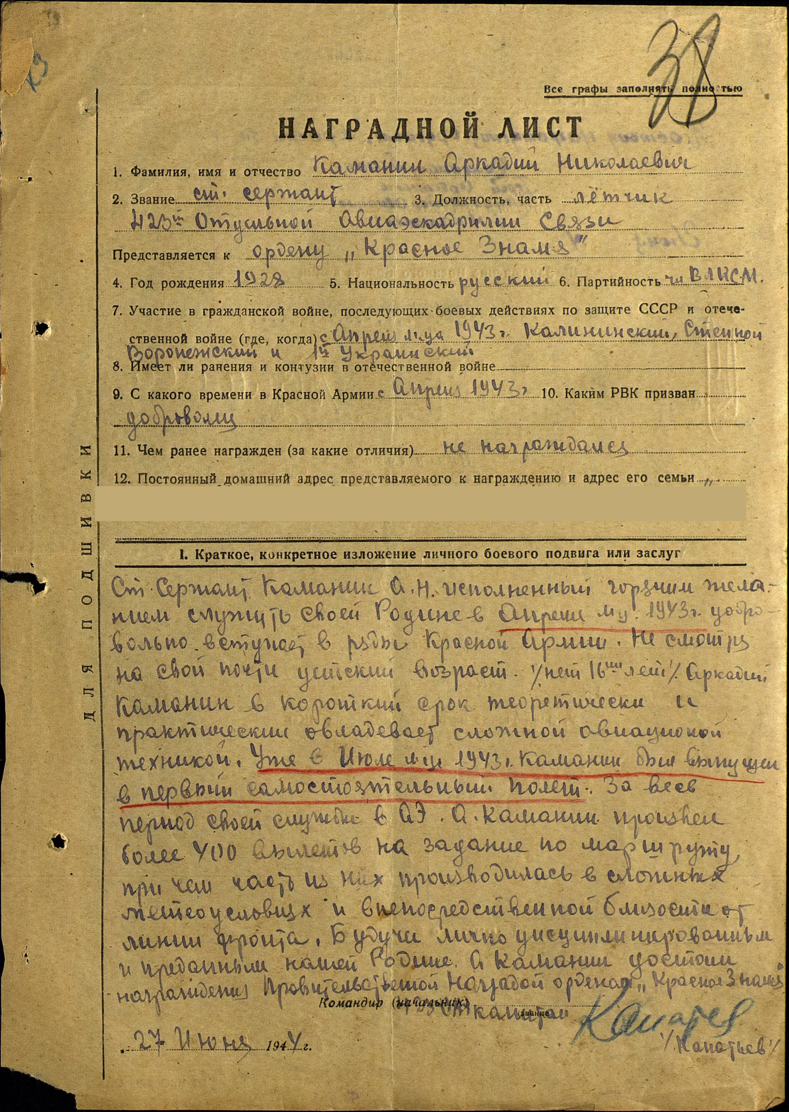 Наградной лист на представление к ордену "Красное знамя" на Каманина Аркадия Николаевича